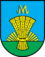 Герб Михайлівського району